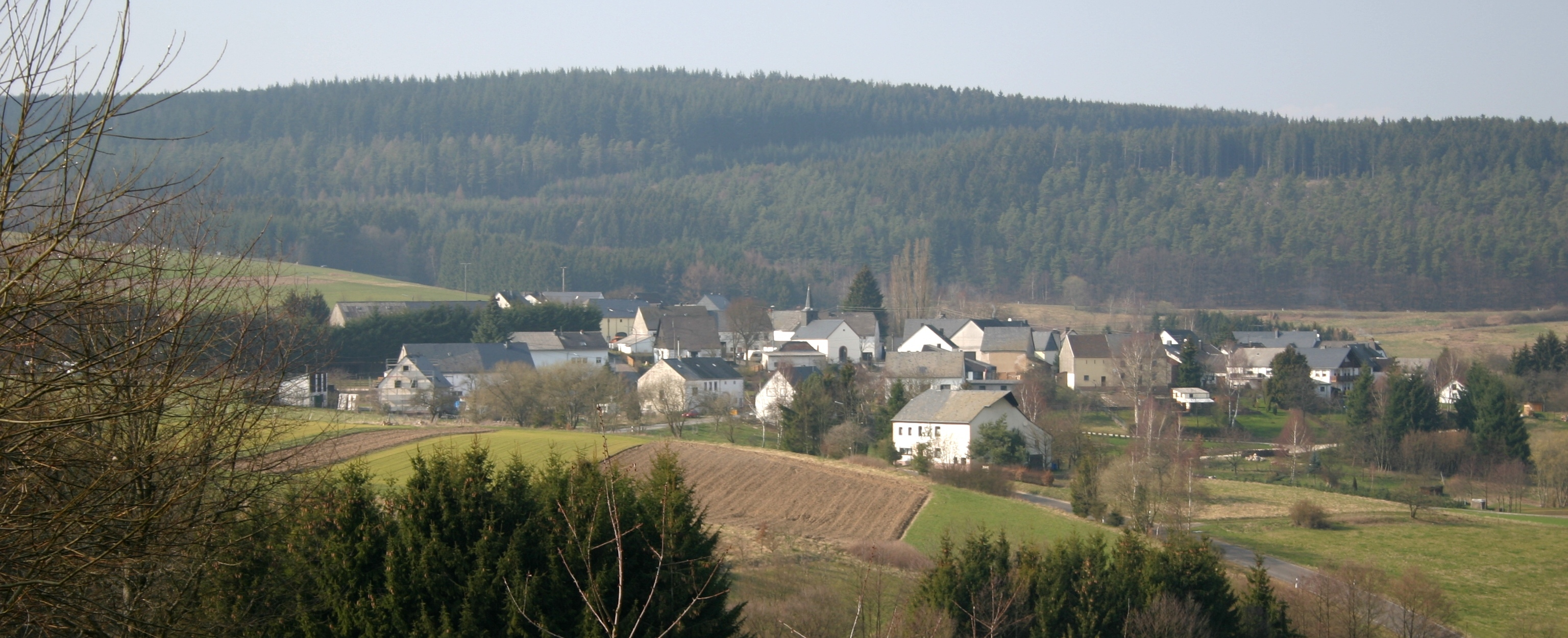 Vue op Hinzert vu Pölert aus gesinn.